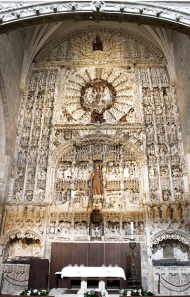 RetabloMayorIglesiadeSanNicolasdeBariBurgos